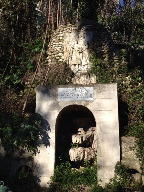 Cité des Aveugles de Guerre, quartier Valrose, Nice. Le monument.